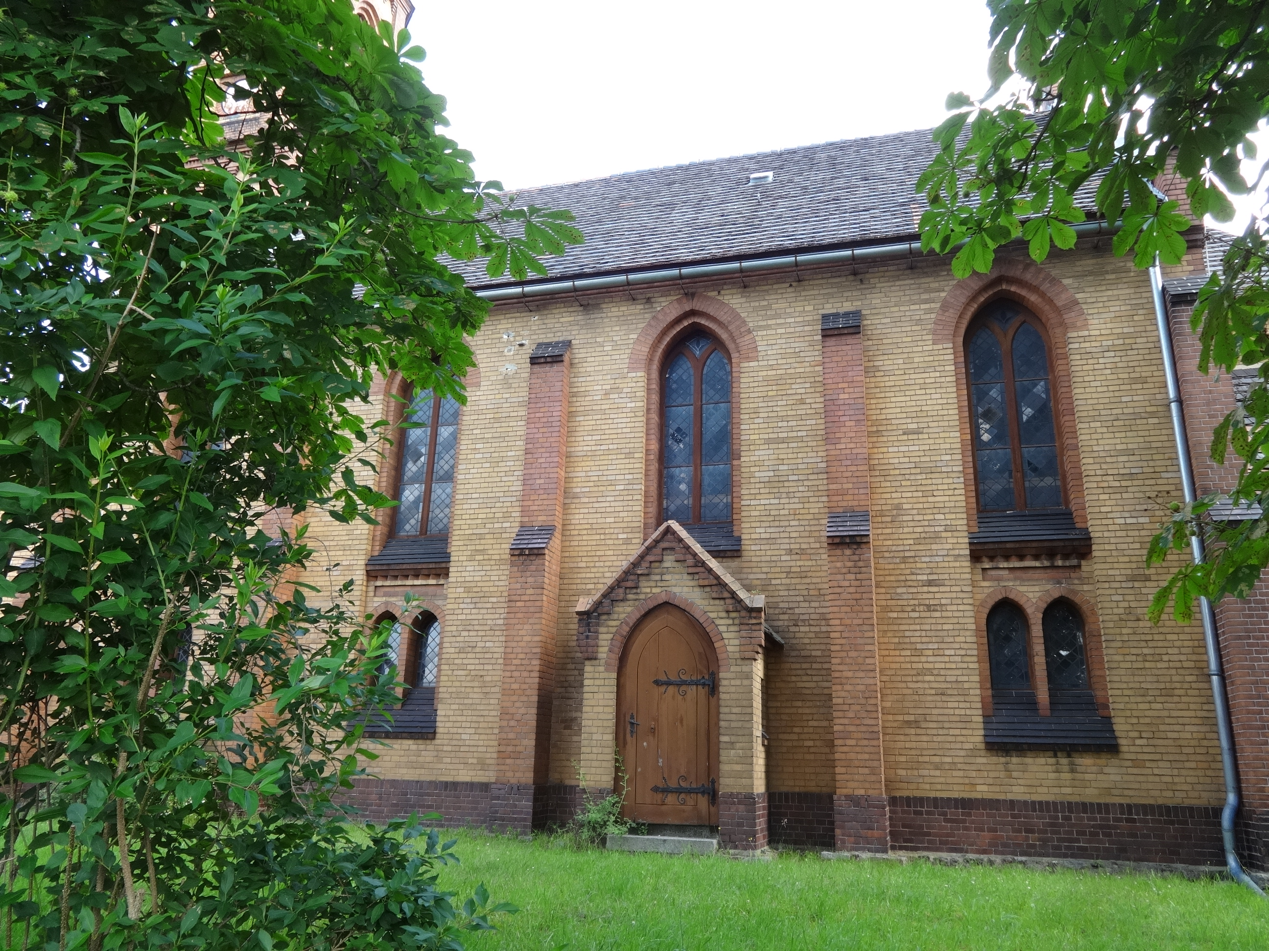 Die Dorfkirche Oderin entstand im Jahr 1894 vermutlich auf den Überresten eines Vorgängerbaus aus dem 17. Jahrhundert. Der streng gegliederte, neugotische Ziegelbau besitzt einen aufwendig gearbeiteten Westturm mit einer polygonalen Apsis.